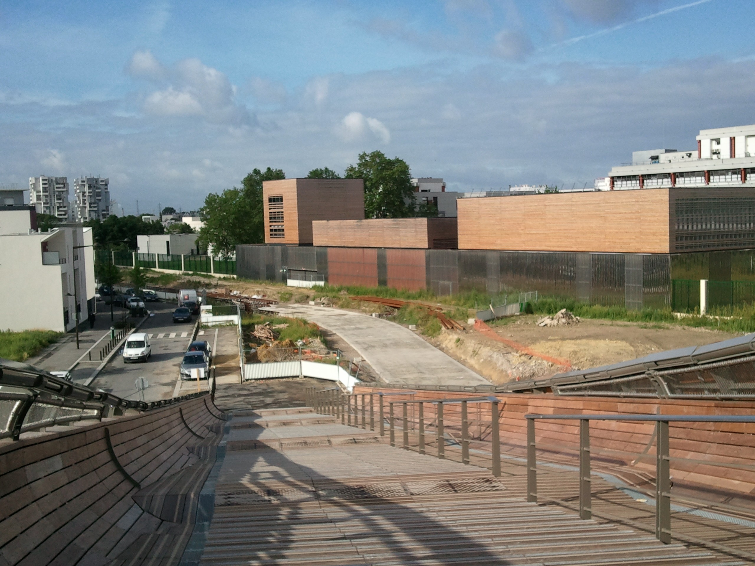 Passerelle de la gare de Villetaneuse-Université vue vers l'Université Paris XIII : à droite, le gymnase universitaire Jackson-Richardson et la clôture de l'université, au centre la plate-forme en travaux du tramway T8